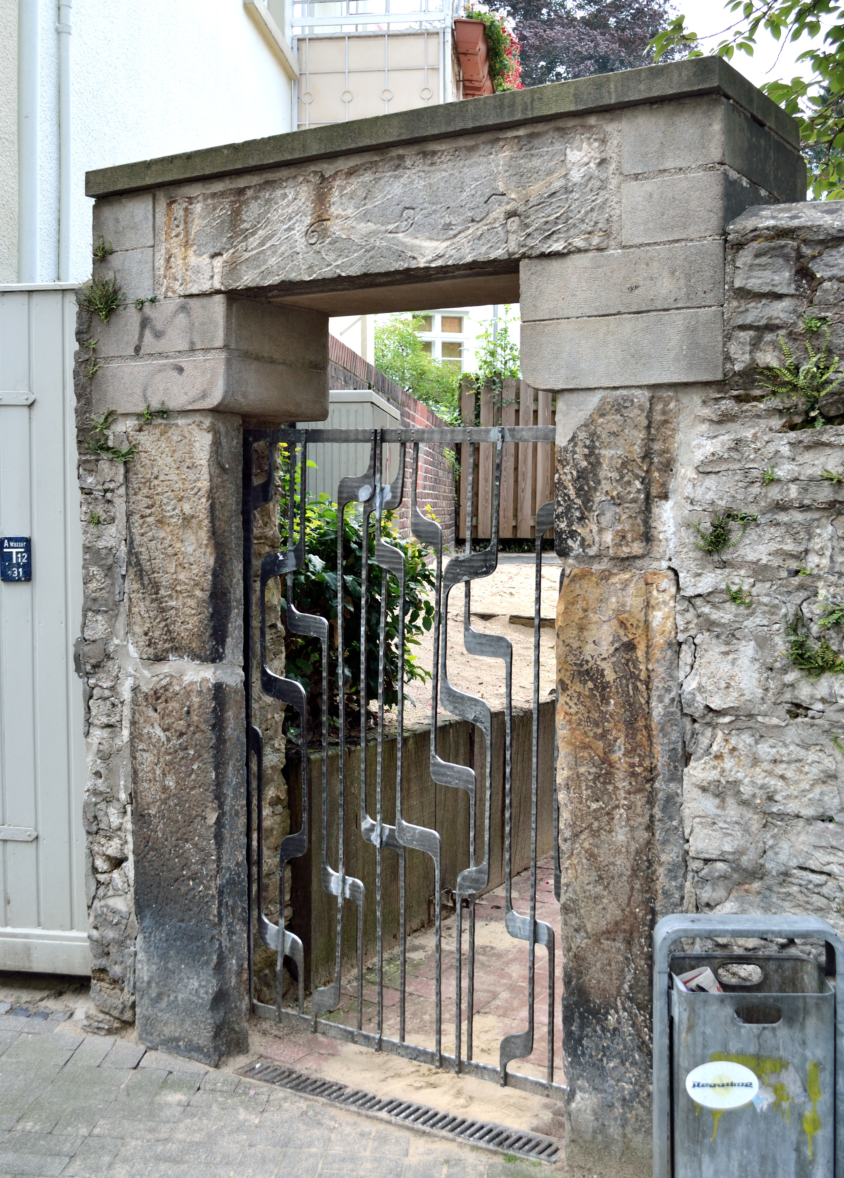 Tor am Mauerrest des ehemaligen Wehmhofs, Inschrift "1695"